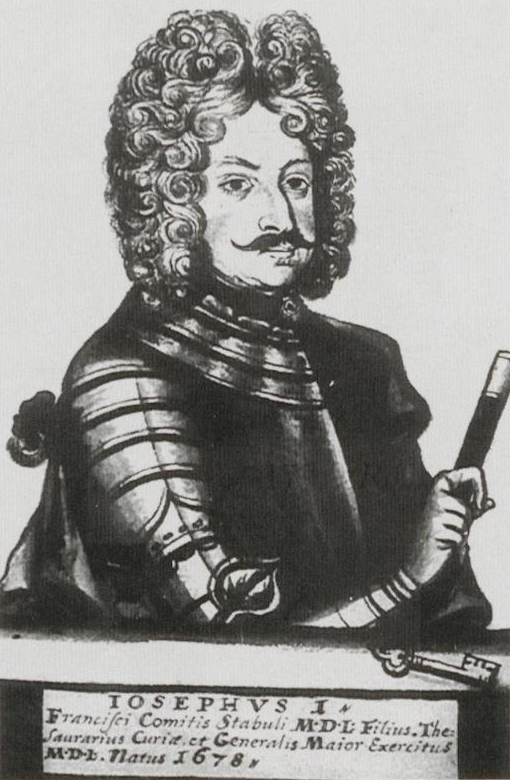 Беларуская (тарашкевіца): Партрэт Юзэфа Францішка Сапегі (Juzef Francišak Sapieha)